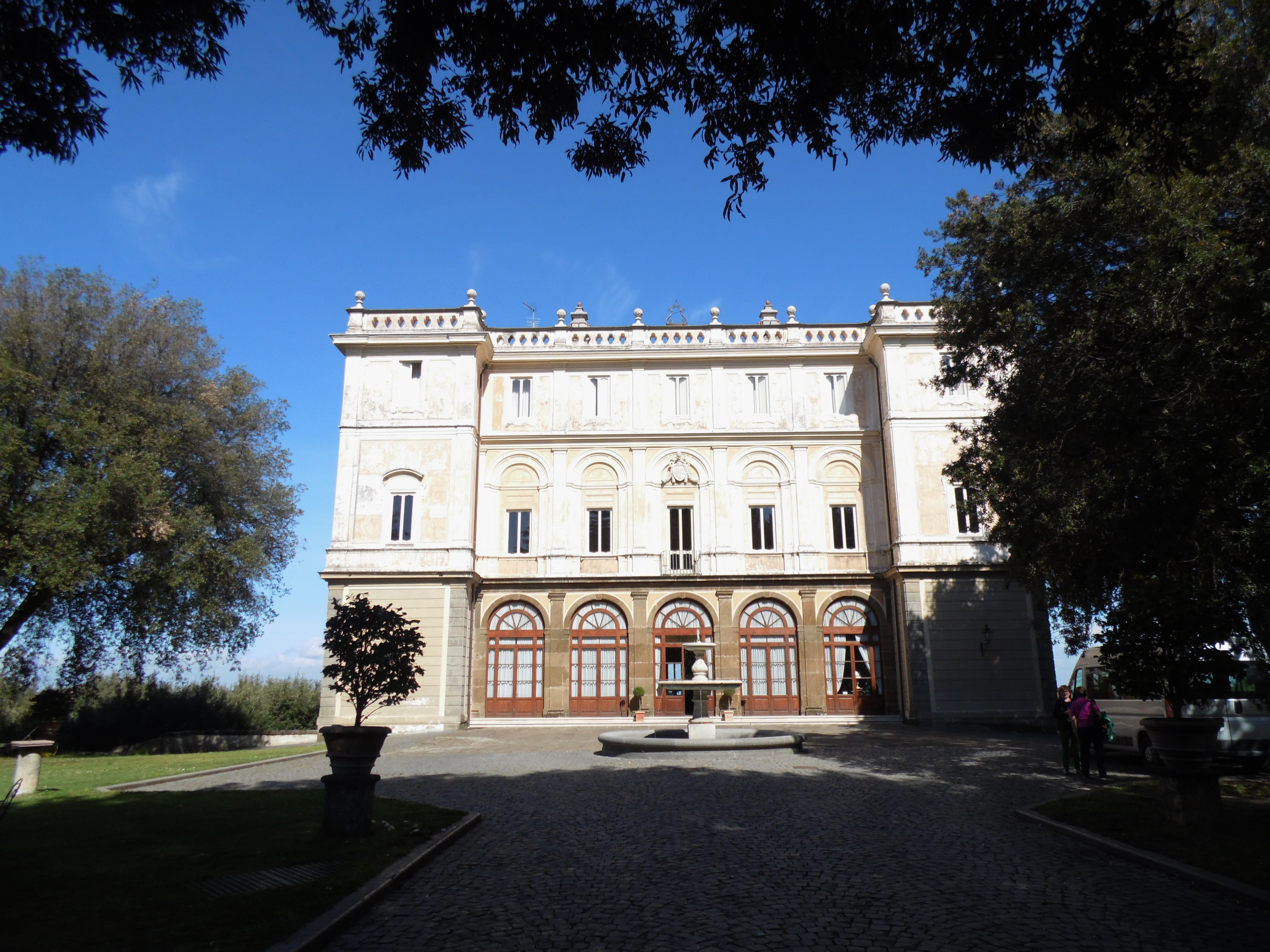 Die ländliche Villa Grazioli ist eine denkmalgeschützte Villa mit Garten in dem Ort Grottaferrata, Region Latium nahe Rom in Italien. Sie ist ein Bauwerk der Renaissance und wurde um 1580 von Kardinal Antonio Carafa errichtet.